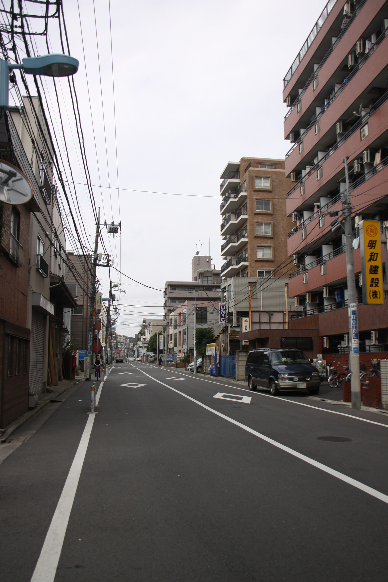 上高井戸